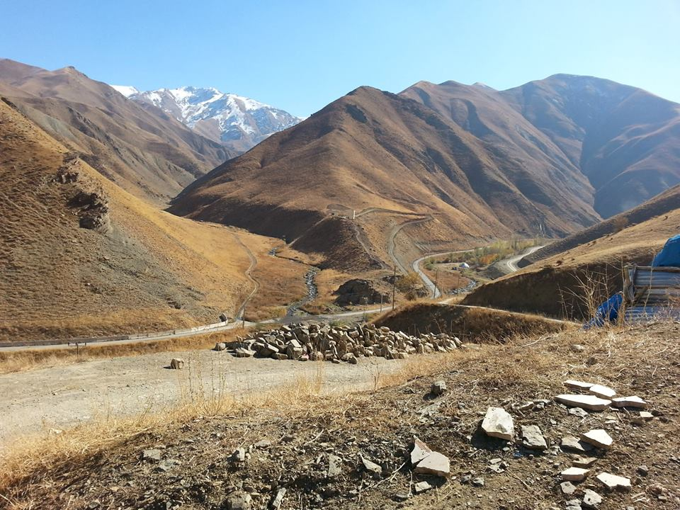 Yüksekova'nın Onbaşılar köyü yakınlarından bir görünüm.